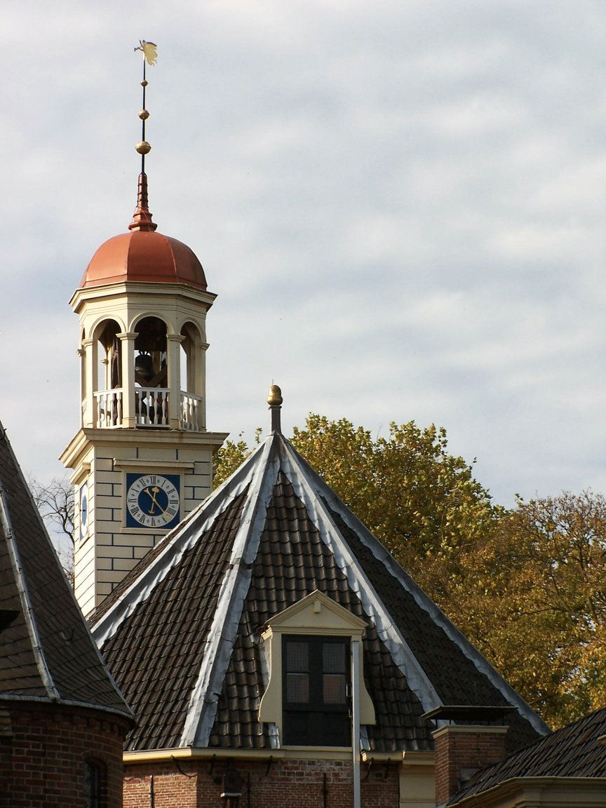 Kloosterkerk or Abdijkerk in Assen